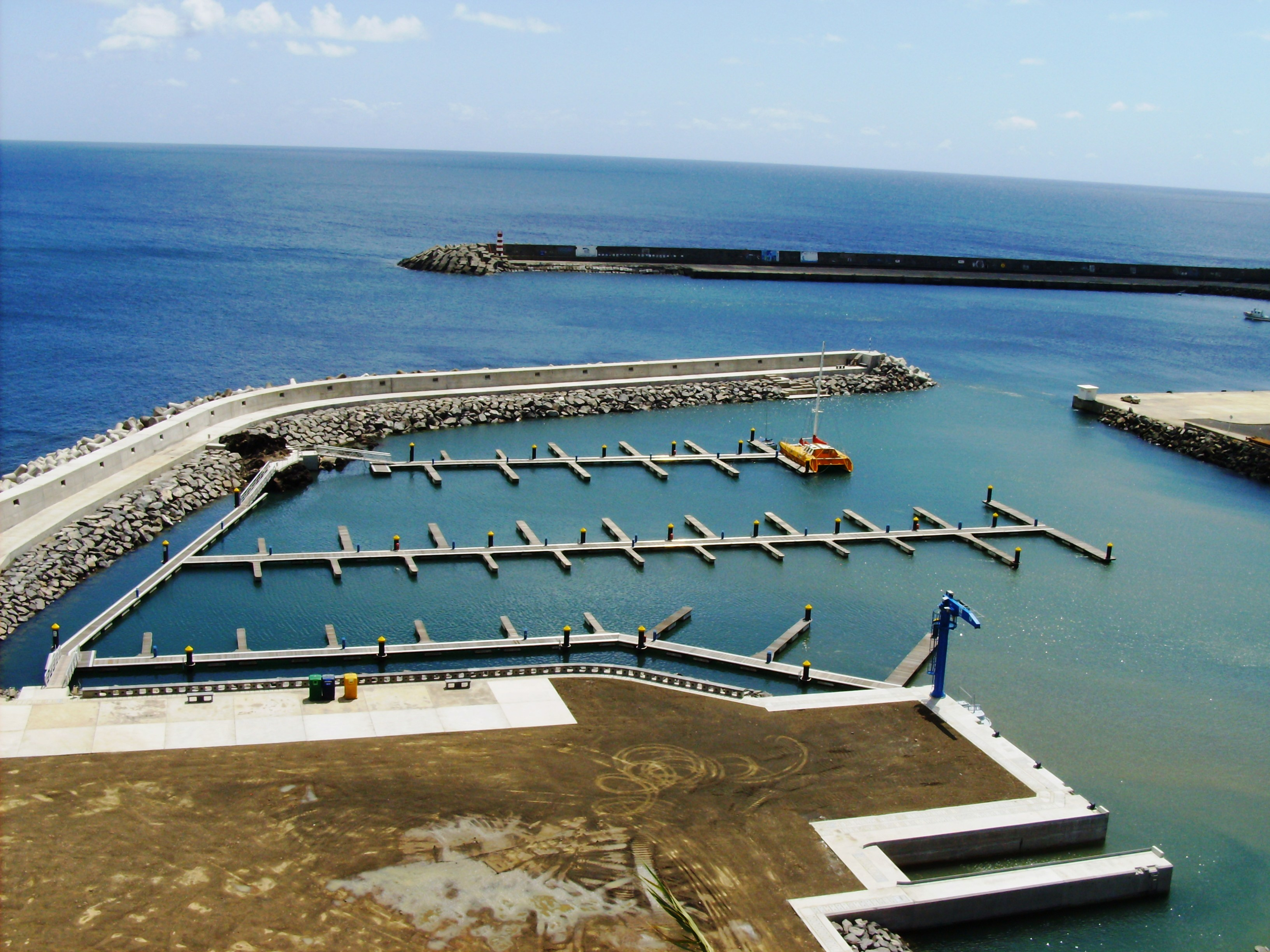 Marina de Vila do Porto, Ilha de Santa Maria (Açores), Portugal.